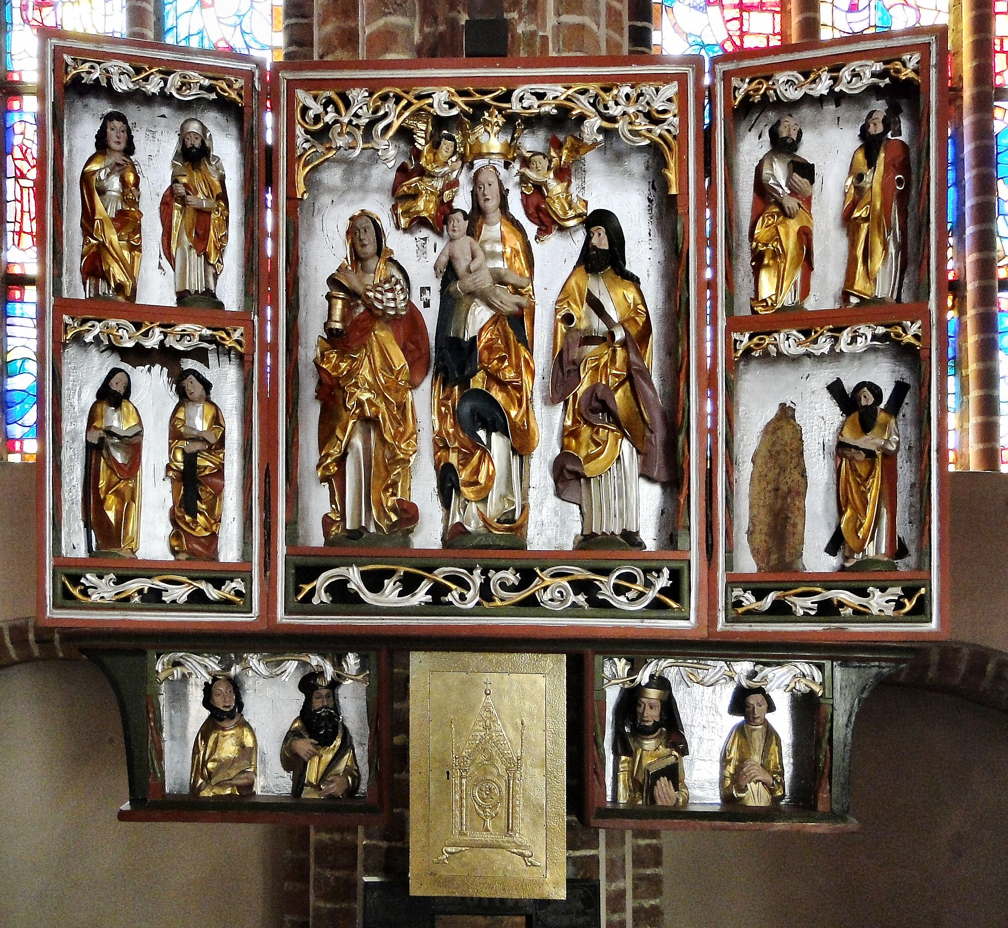 Szczecin Katedra św. Jakuba